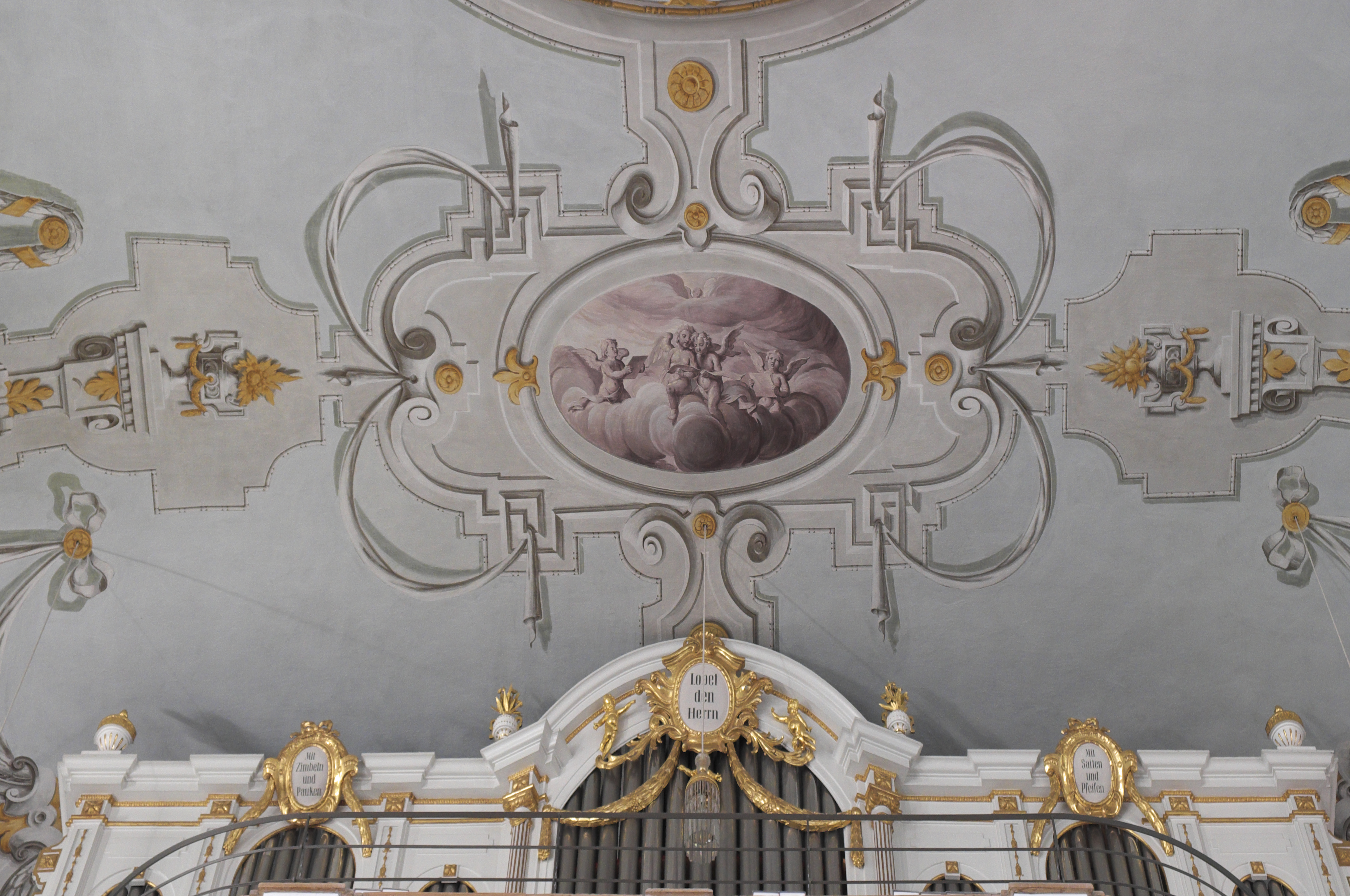 Katholische Pfarrkirche Mariä Heimsuchung in Lechbruck am See im Landkreis Ostallgäu (Bayern/Deutschland), Grisaille über der Orgelempore